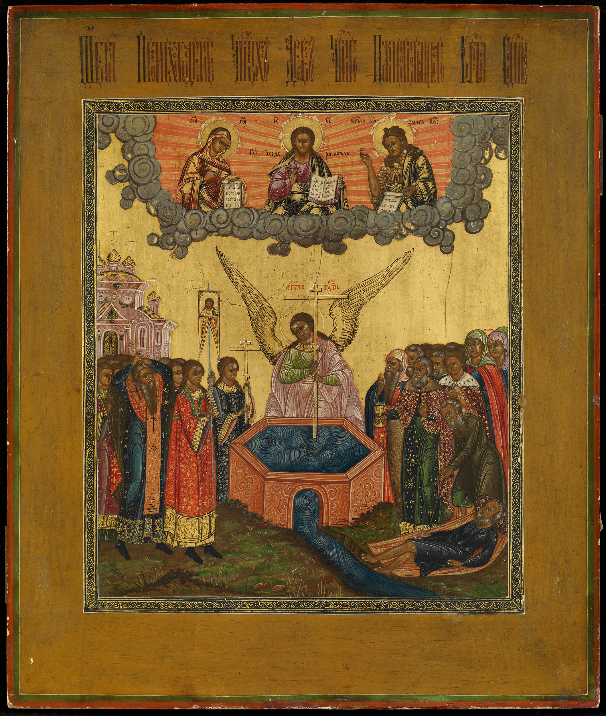 THE EXALTATION OF THE TRUE CROSS PALEKH, MID 19TH CENTURY